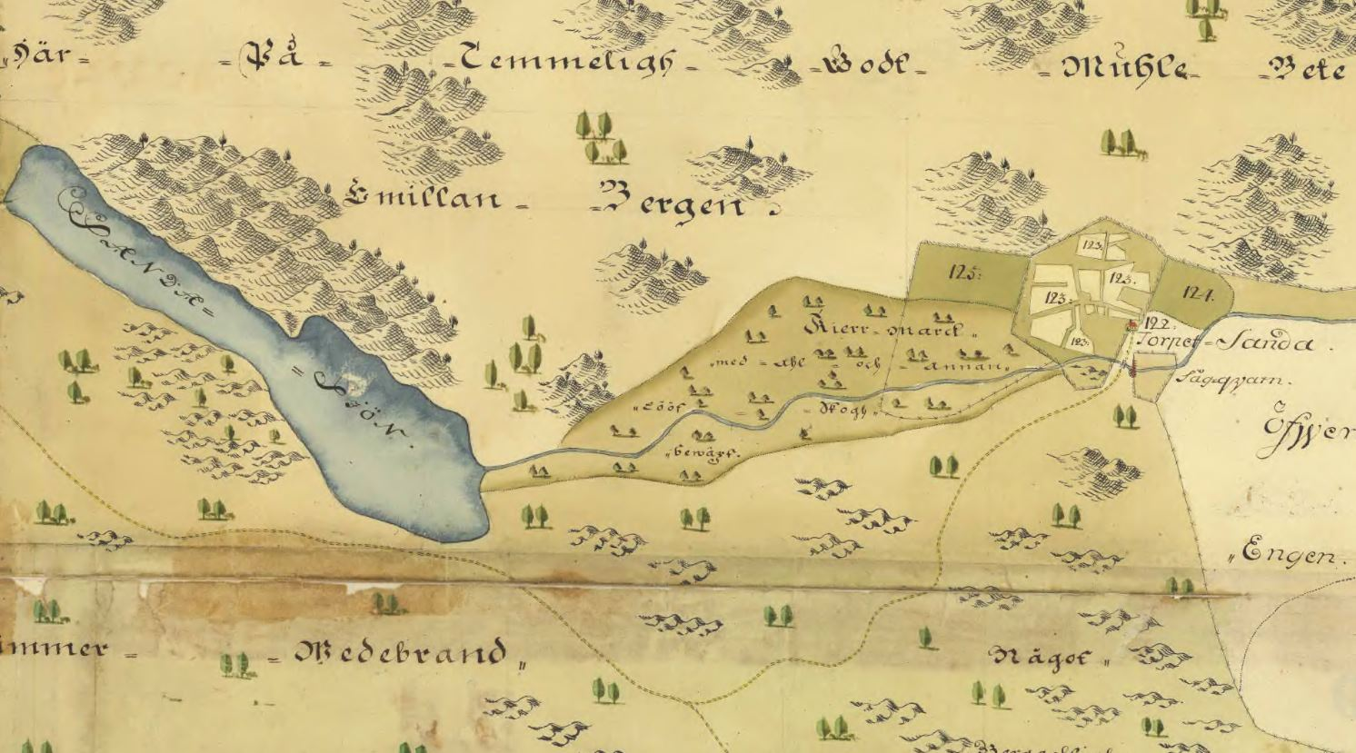 Del av Erstaviks ägor visande Sandasjön och torpet Sanda